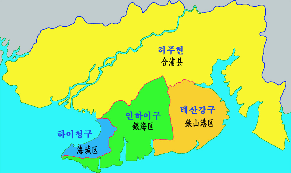 광시 베이하이시 현급구역도